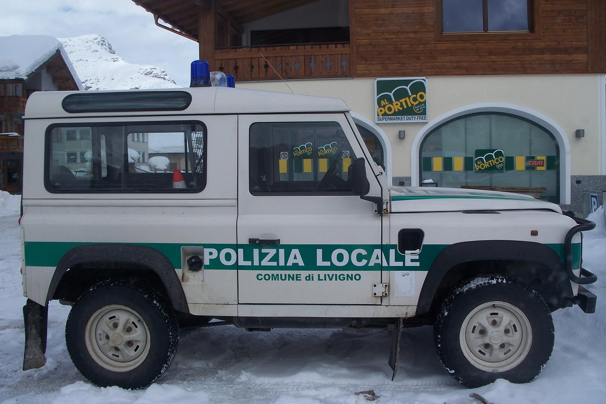 Livinjo policijos ekipažas